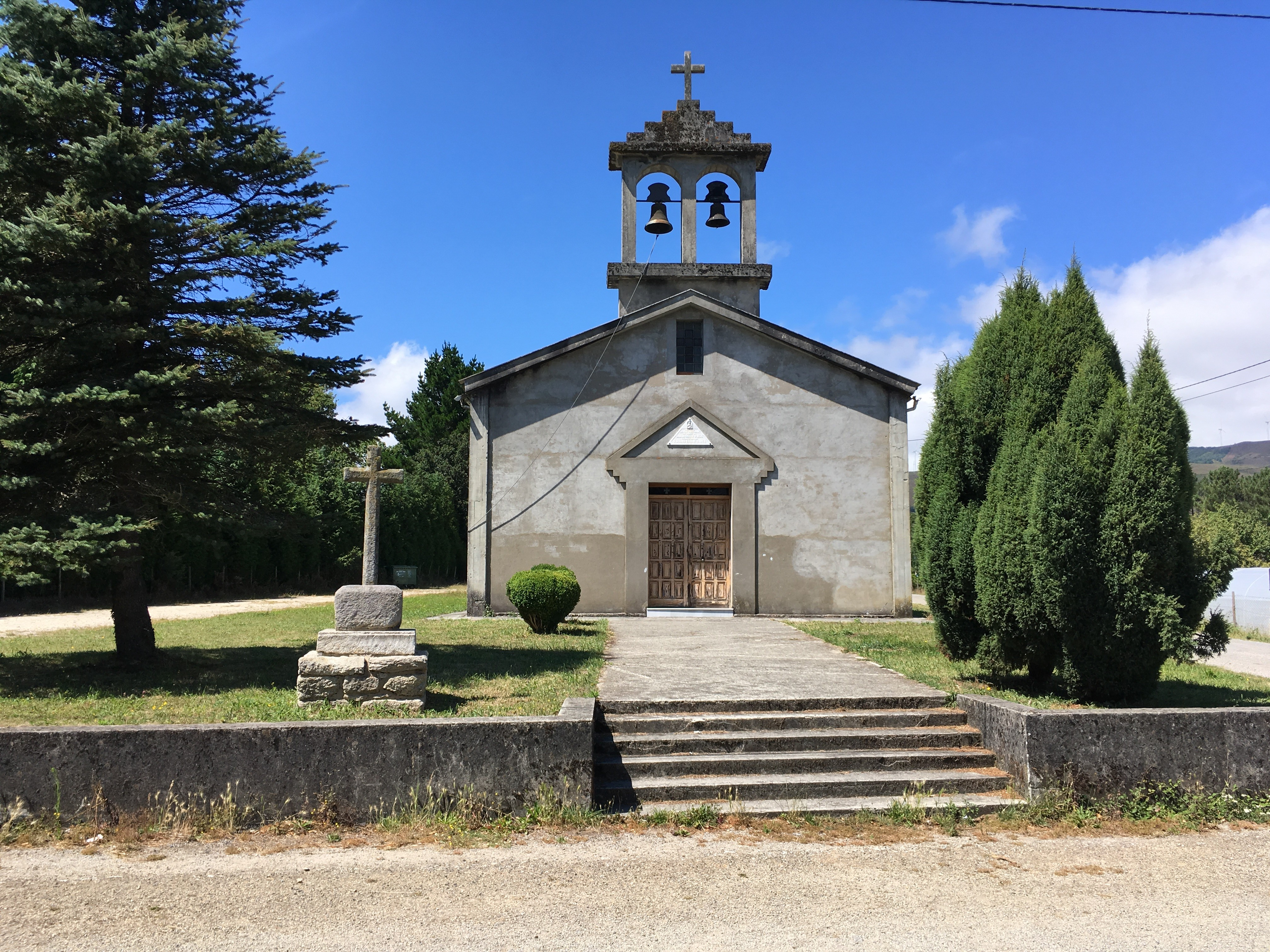 Vista frontal da Igrexa nova de Vilapedre no Concello de Vilalba e mailo cruceiro